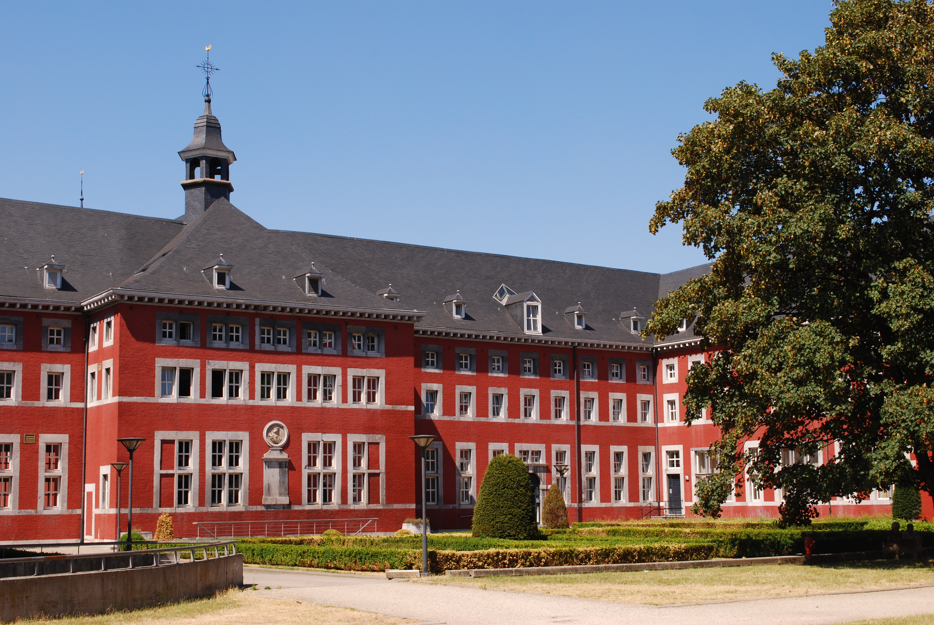 Le Vertbois, ancien "Hospice des incurables et des filles repenties", à Liège ; aujourd'hui siège du Conseil économique et social de la Région wallonne, et de la Commission Royale des Monuments, Sites et Fouilles.